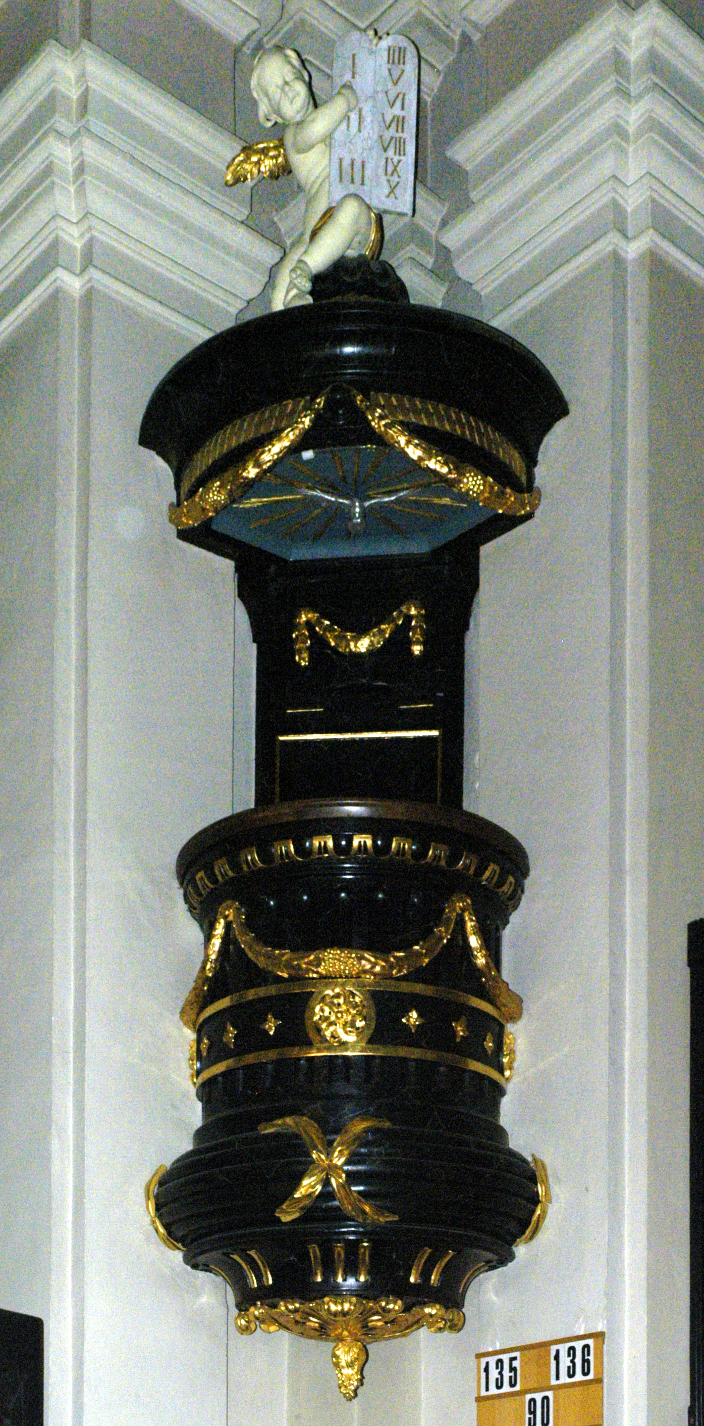 Kanzel der katholischen Pfarrkirche heiliger Veit in Maissau